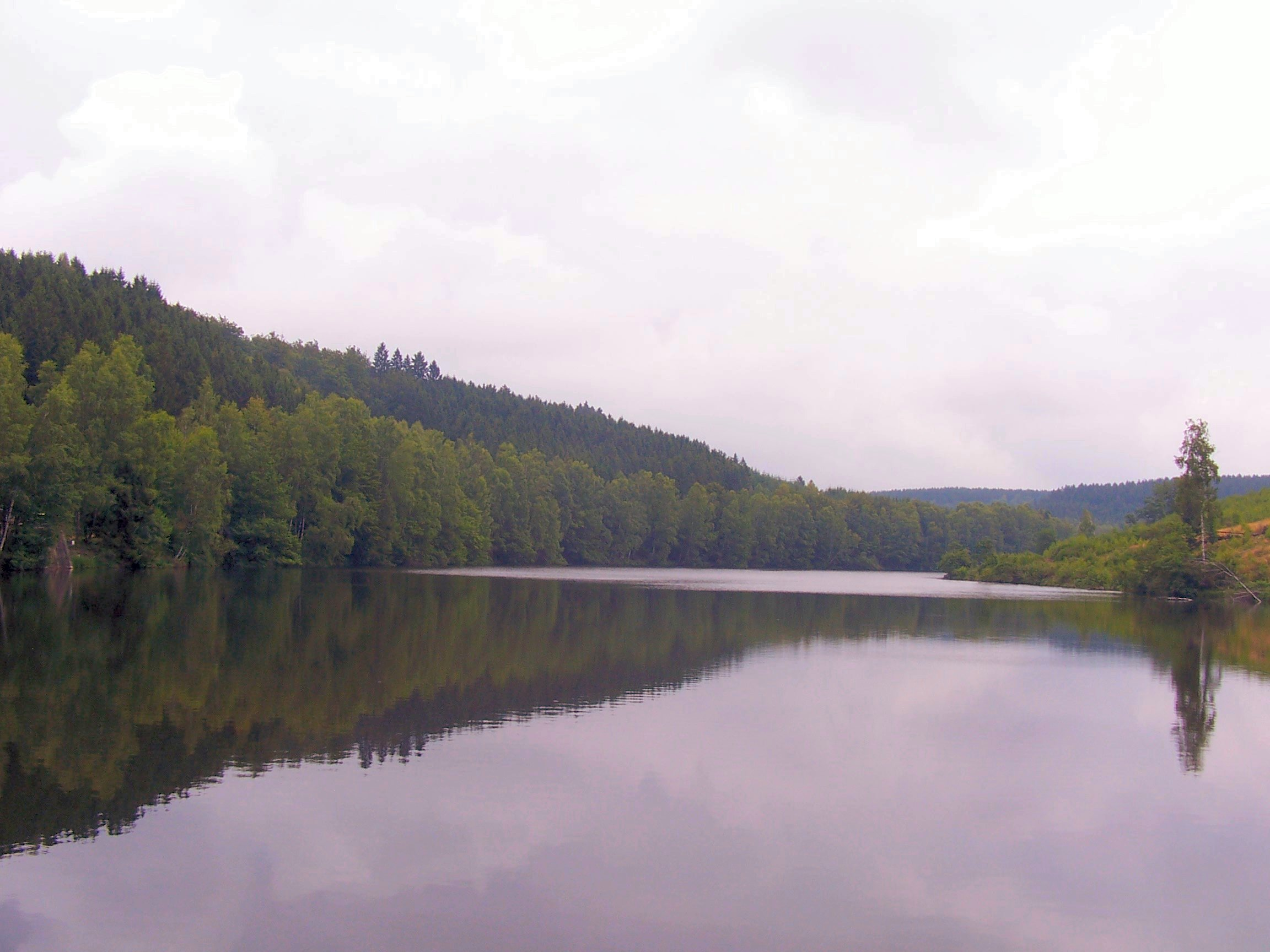 Stuwmeer op de Vierre nabij Suxy.